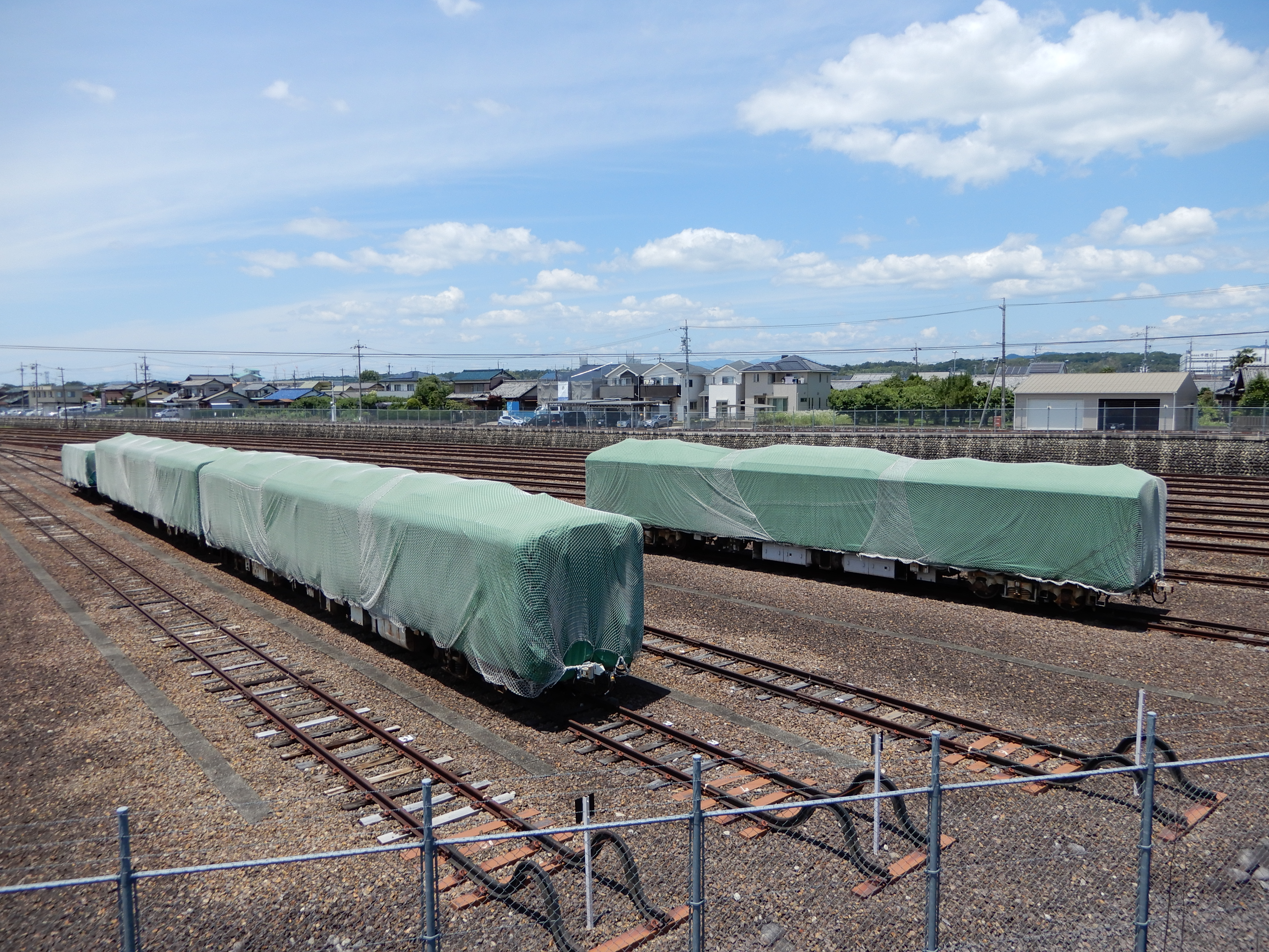 美濃太田車両区で保存されている車両の様子。手前側の3両はトキ900、キハ30、キハ58、奥の1両はクモハ103。 2020年6月20日撮影。